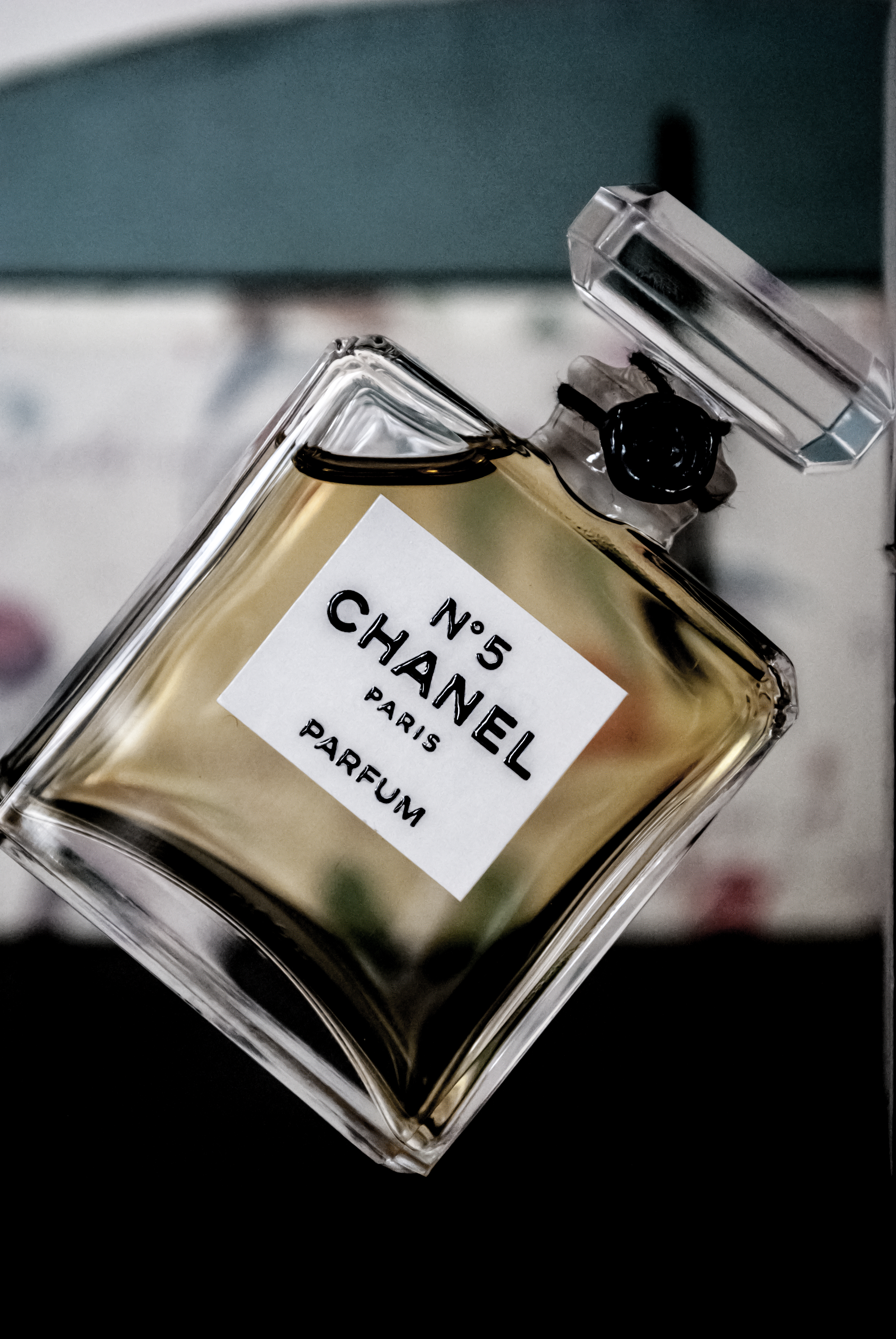 Chanel N°5 perfume.